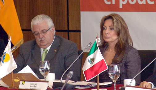 Ivonne Juez de Baki, Presidenta del Parlamento Andino Ivonne Juez de Baki, Presidenta del Parlamento Andino